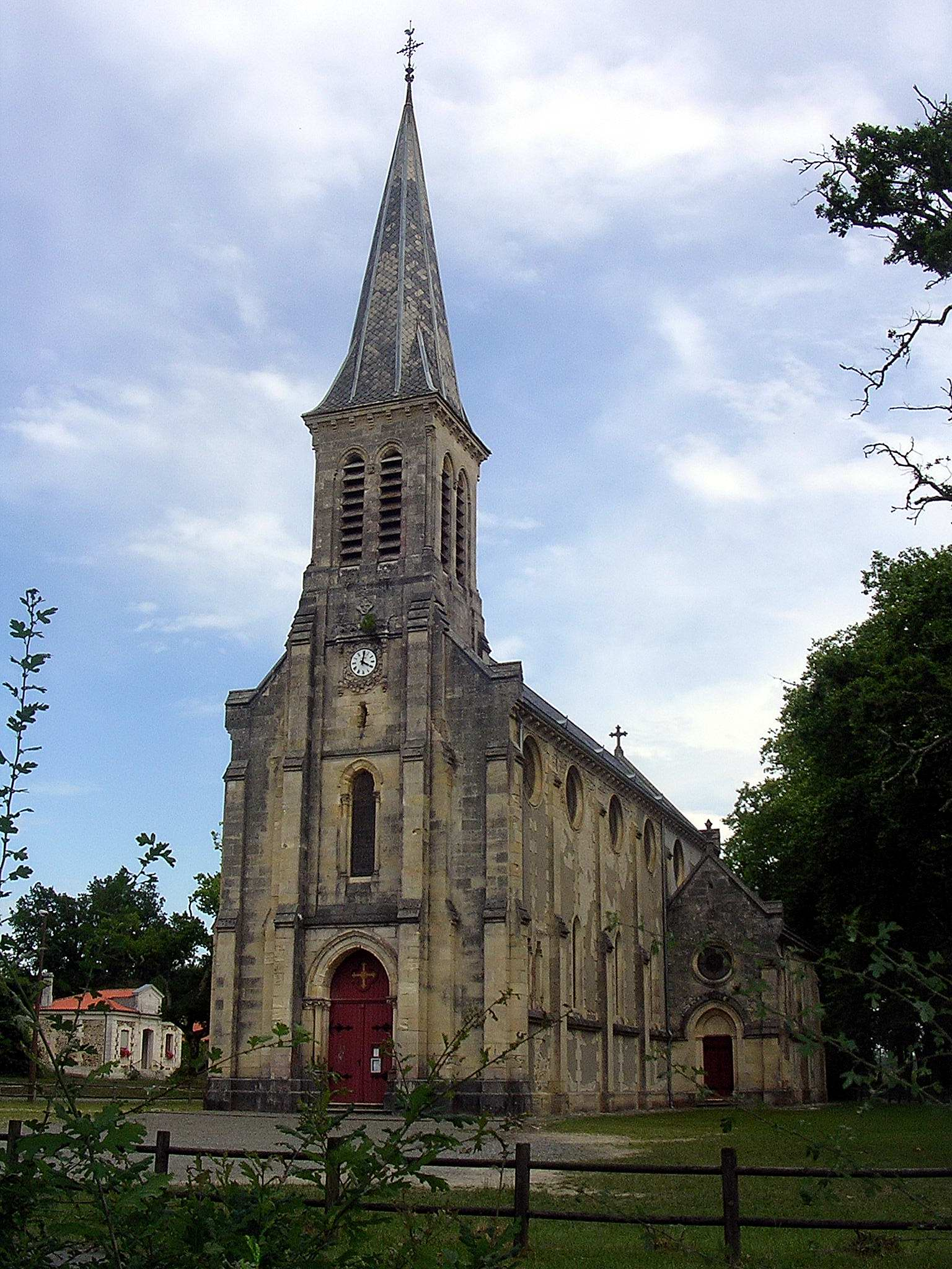 Église Saint-Louis d'Uza, dans le département français des Landes